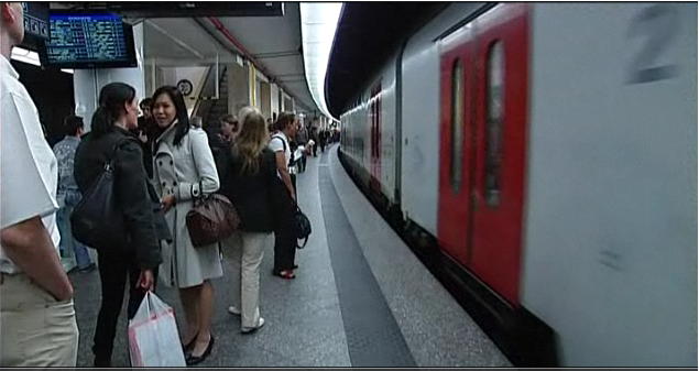 Vernieuwd perron van Brussel-Centraal.